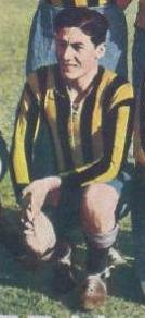 Nazareno Luna